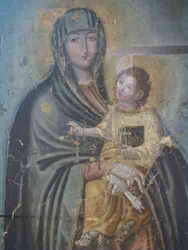 Маці Божая Снежная. XVIII ст. З нясвіжскага касцёла бенедыкцінак. Музей старажытна беларускай культуры НАН Беларусі